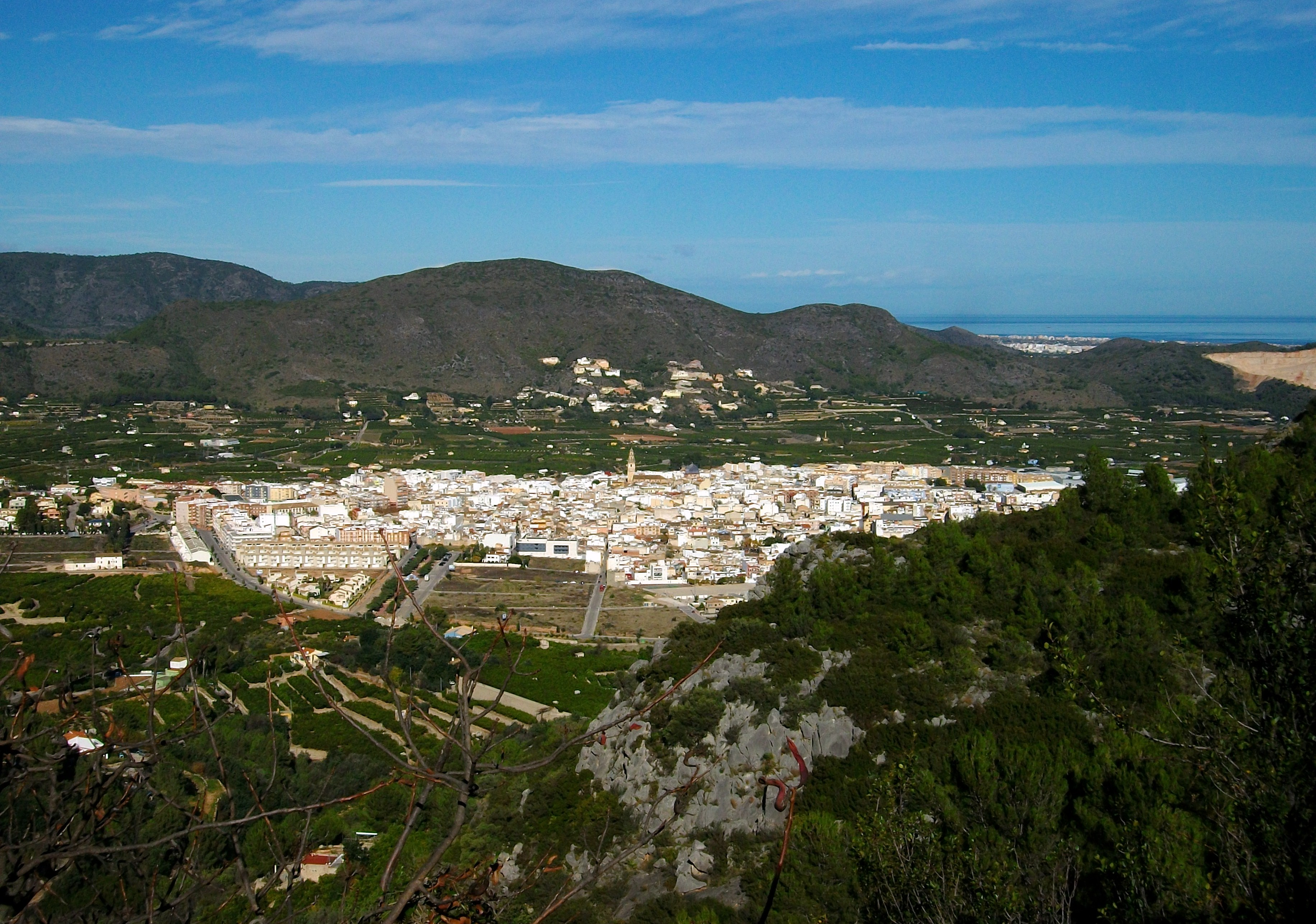 Vista de Pego, Marina Alta, País Valencià.